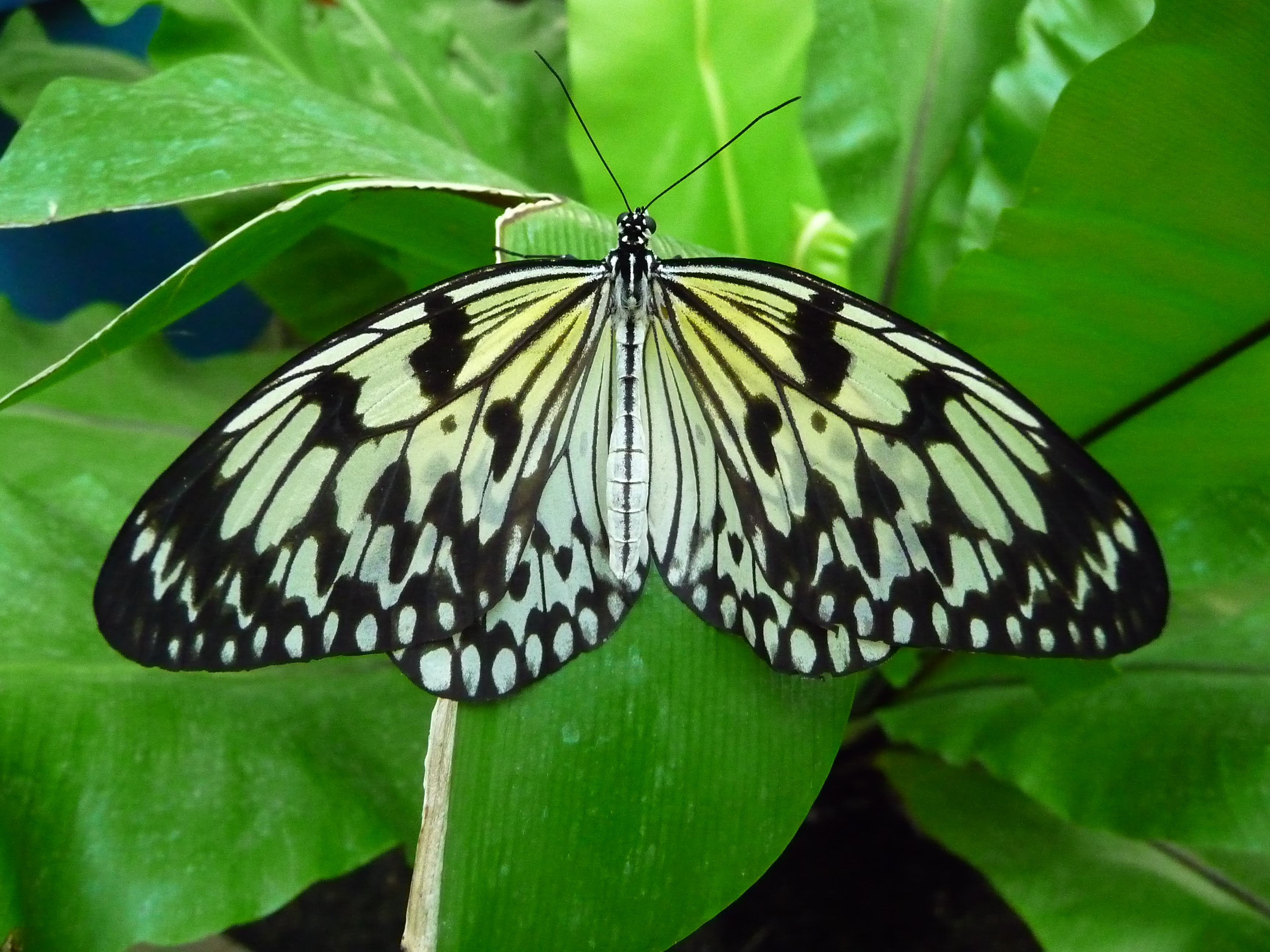 Weiße Baumnypmhe (Idea leuconoe)